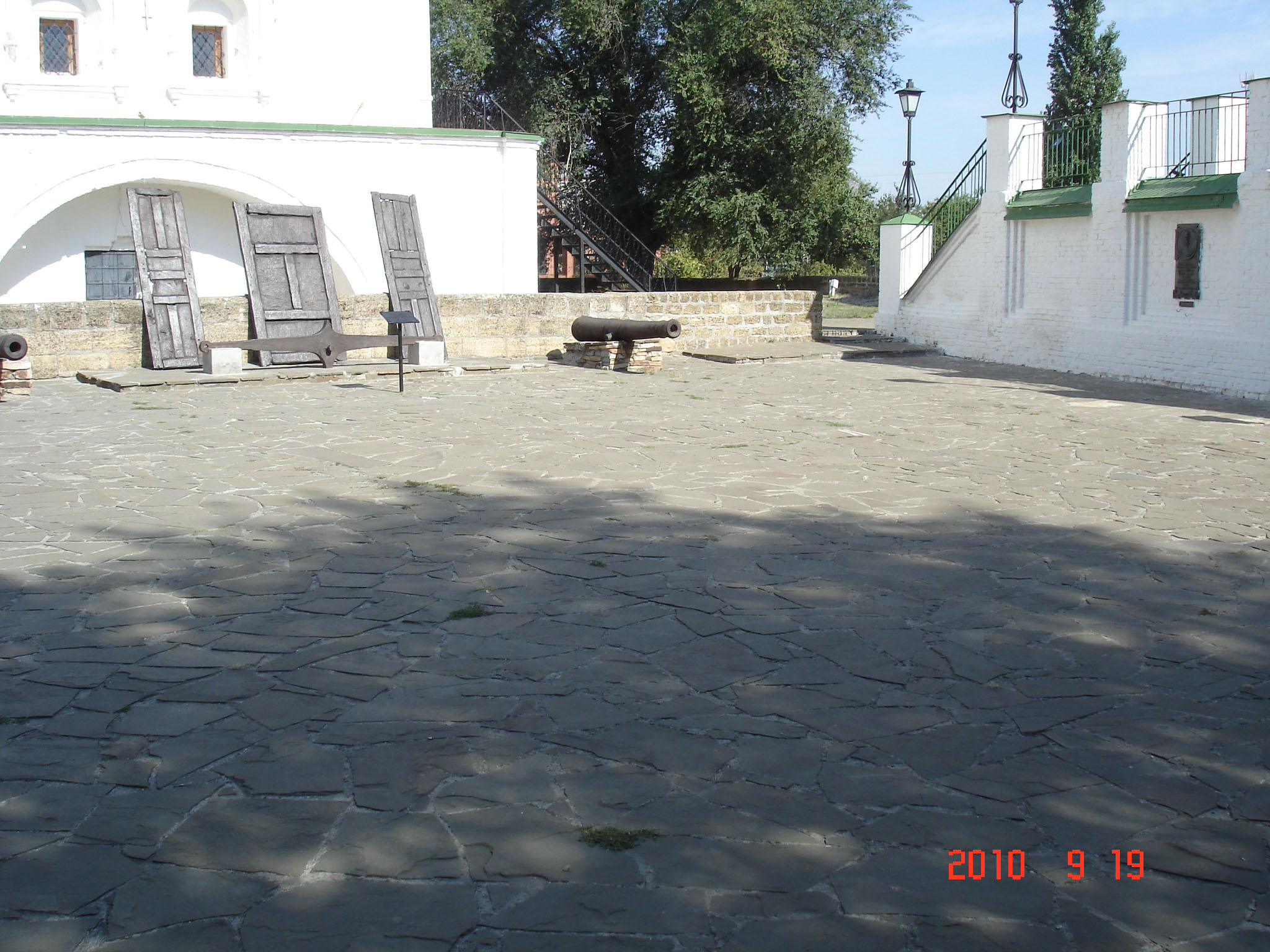 Старочеркасск - казачий майдан